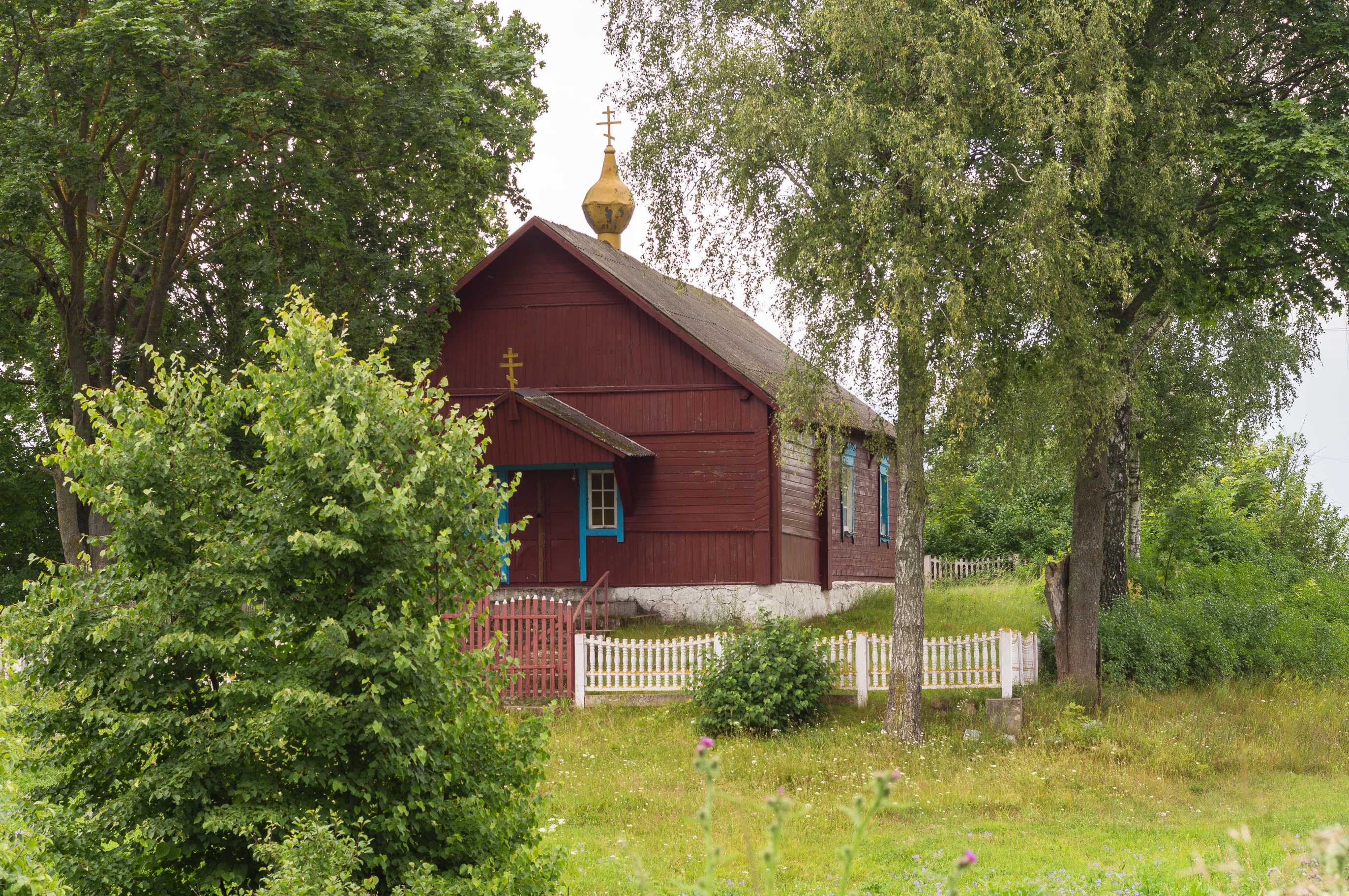 Стараверская царква Богаз'яўлення Гасподняга